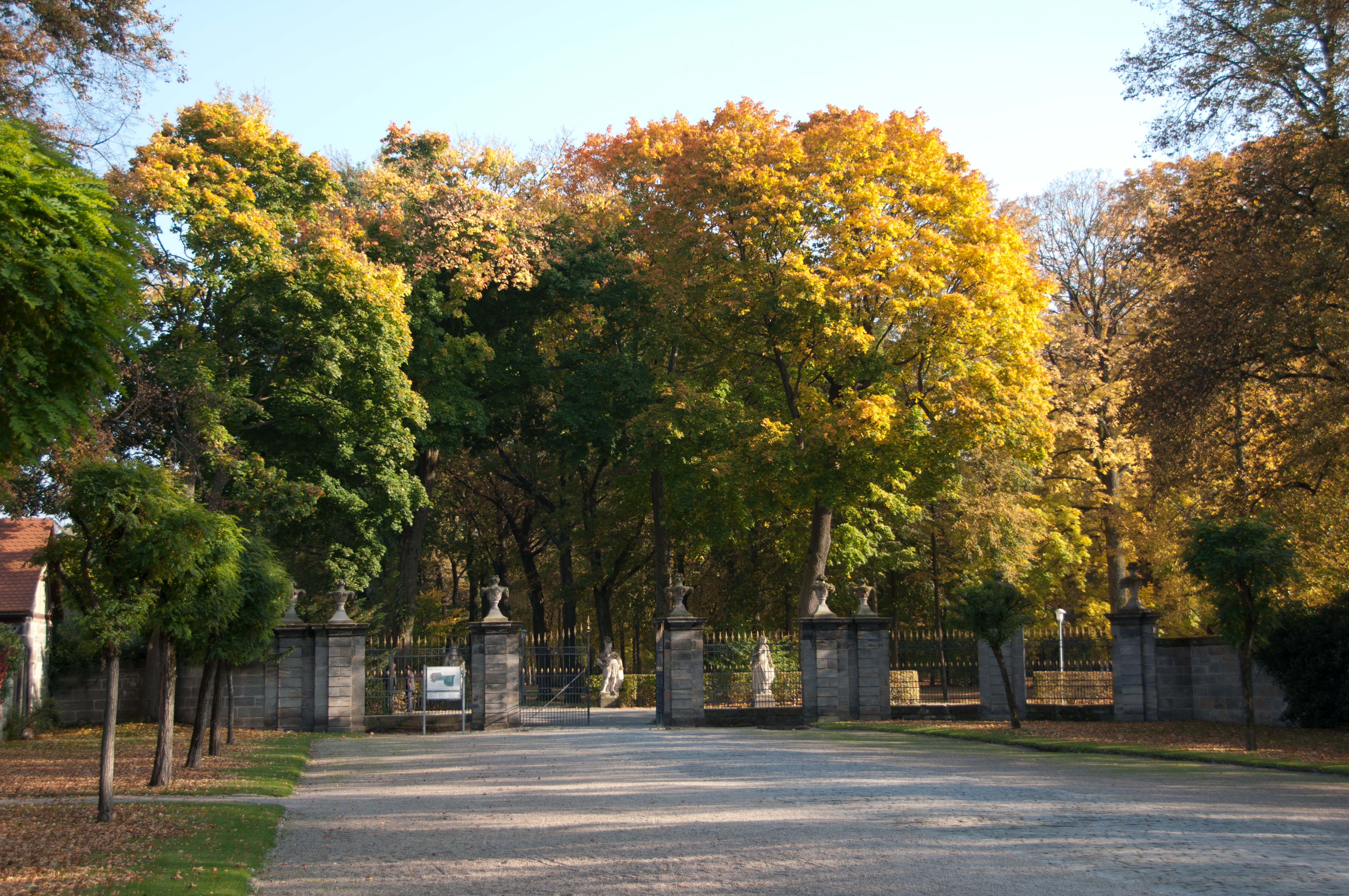 Der Bayreuther Hofgarten vom Neuen Schloss aus gesehen